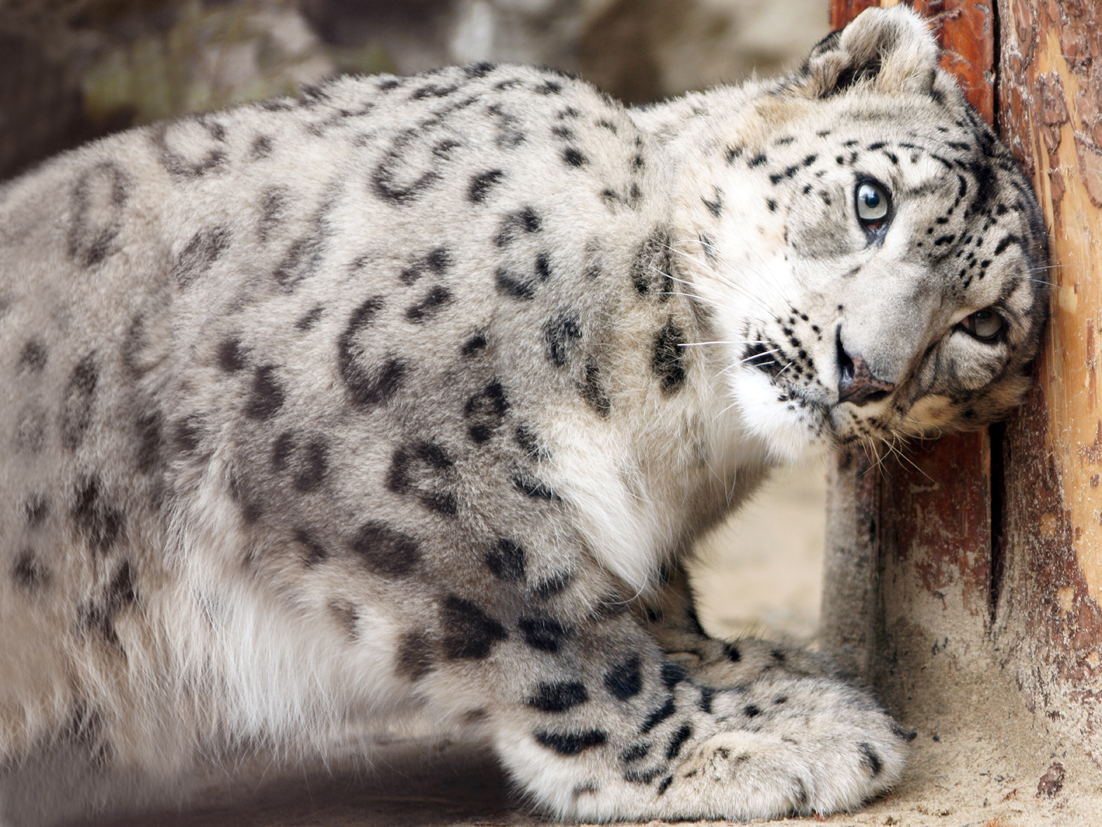 Snow leopard